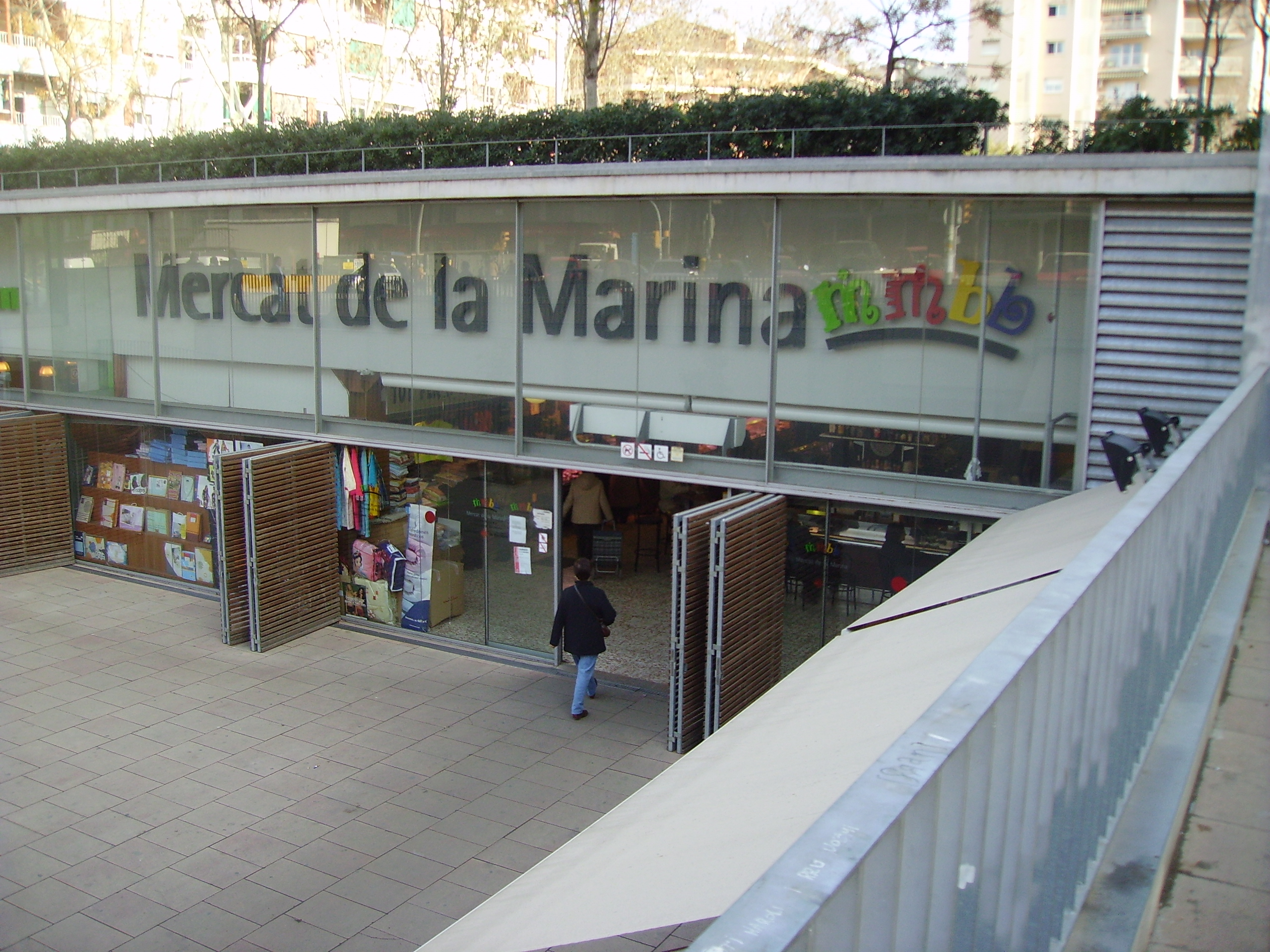 Mercat de la Marina, Barcelona, Catalunya.